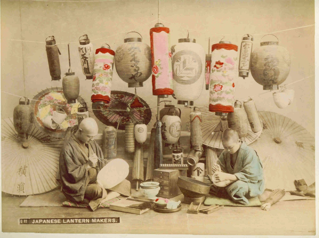 Fotograf: Kusakabe Kimbei (Kinbei) Zuschreibung nach dem Buch von Heinz Spielmann “dumont foto 5 Die japanische Photographie” Köln 1984 Abb. 105b, dort: event. Atelier Kusakabe Kimbei ca. 1890. “Q 82 Japanese Lantern Maker (einbelichteter Original-Titel). Es gibt diesen Laternenmacher in mehreren Varianten fotografiert, mit wechselnden Gehilfen und veränderten Hintergründen. Auf einem Schirm bzw. einer Laterne steht: Yokohama Makane-michi. Handkoloriertes Albumin-Foto. Foto: 22 x 28 cm quer (aufgezogen auf Karton: 33 x 48,5 cm quer).